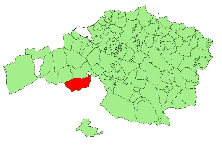 Situación de Gordejuela